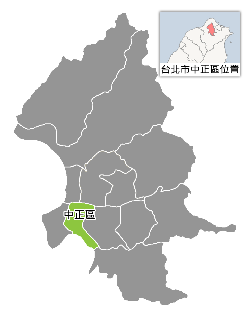 中文（台灣）: 台北市中正區位置。